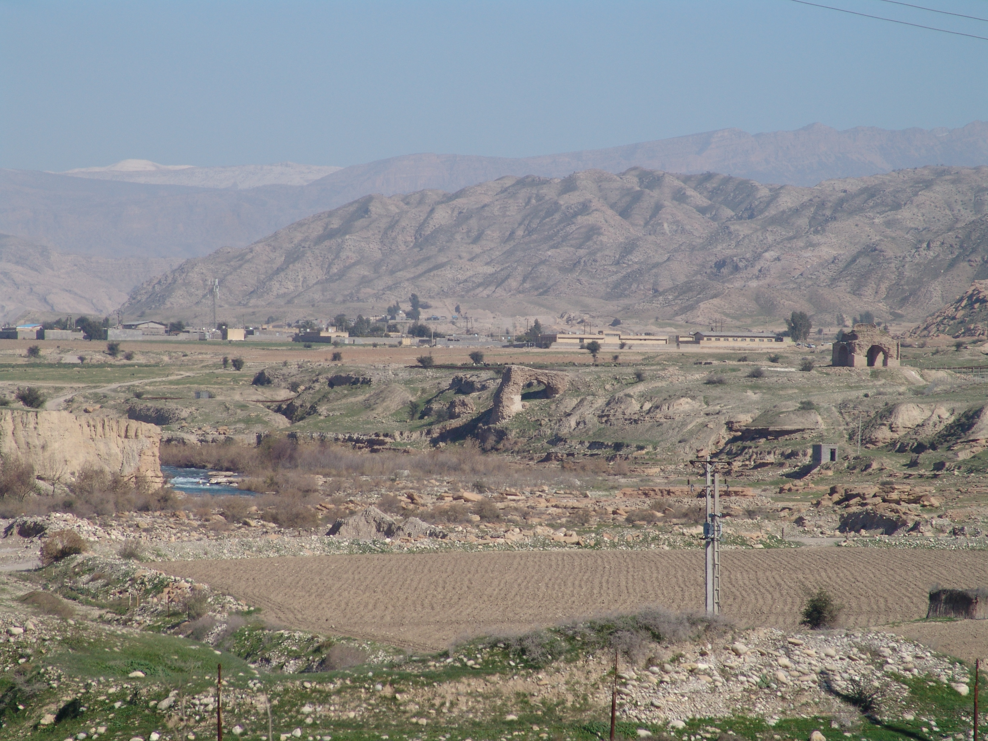 چهارطاقی خیرآباد در روستای خیرآباد، دهدشت